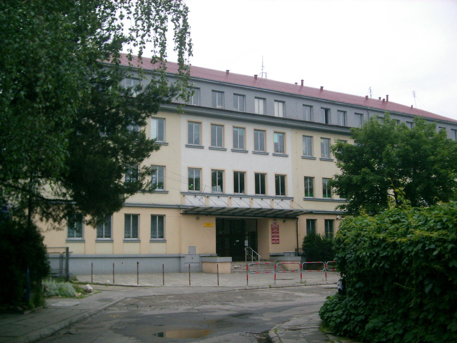 Szkoła Podstawowa nr 75, Olsza, Kraków